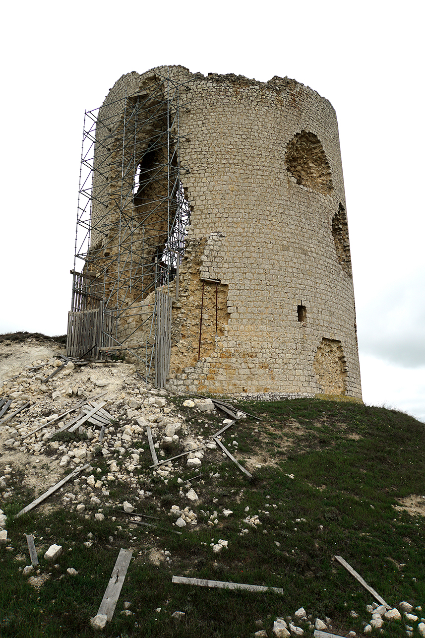 Vista general del estado del andamiaje exterior y el apuntalamiento de la torre